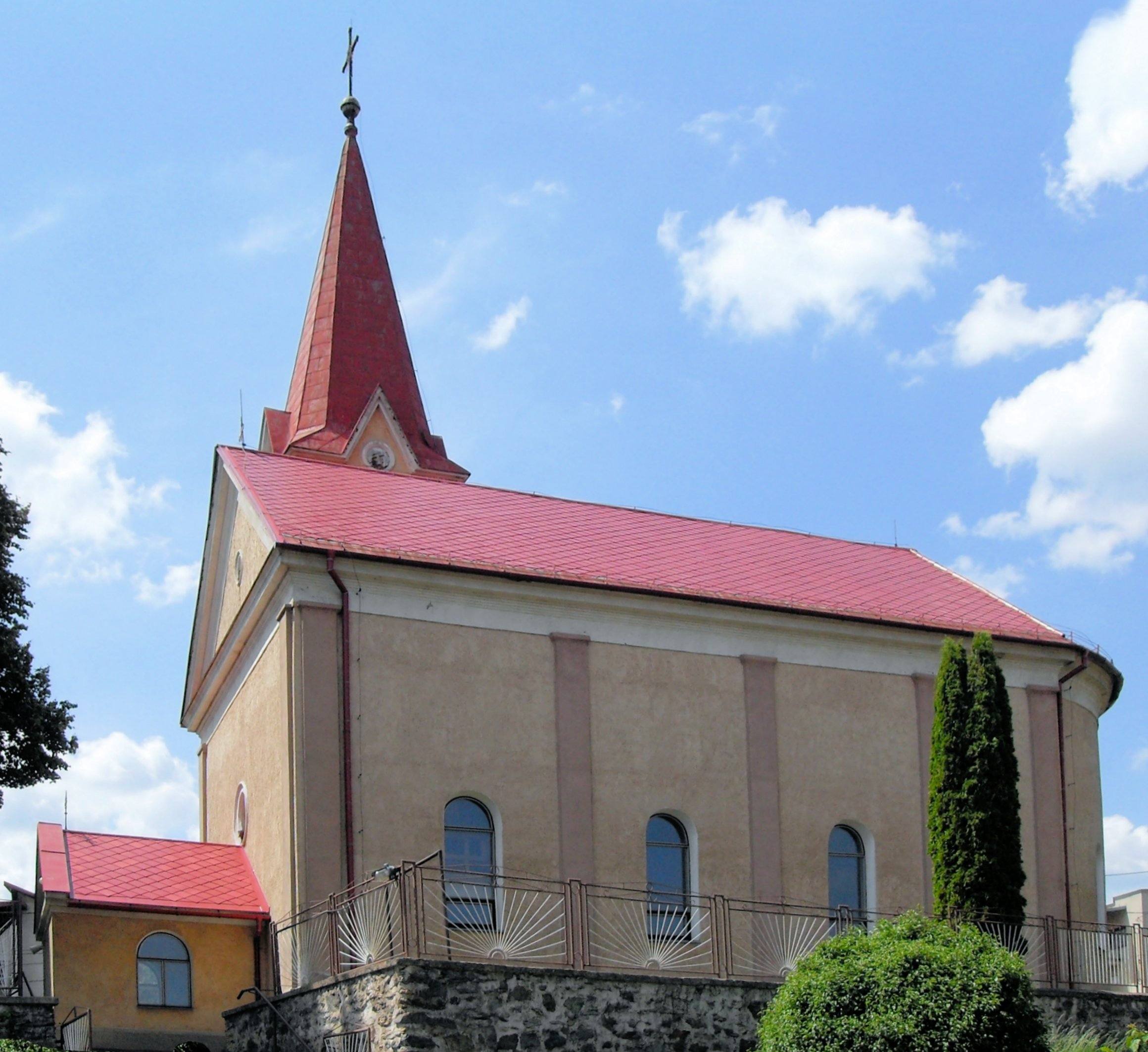 Vyšný Klátov, Rímskokatolícky kostol Najsvätejšej Trojice